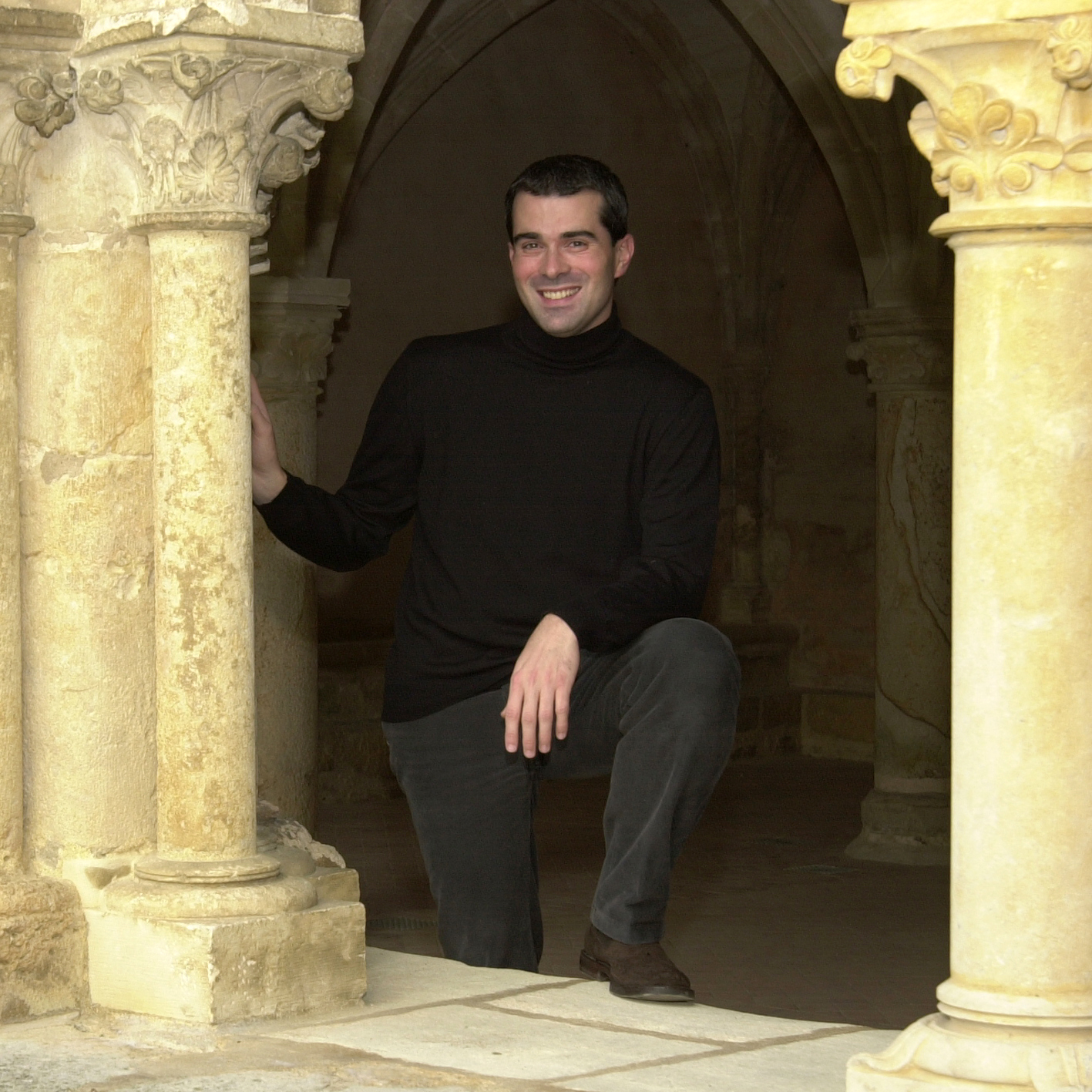 Alberto Nosè